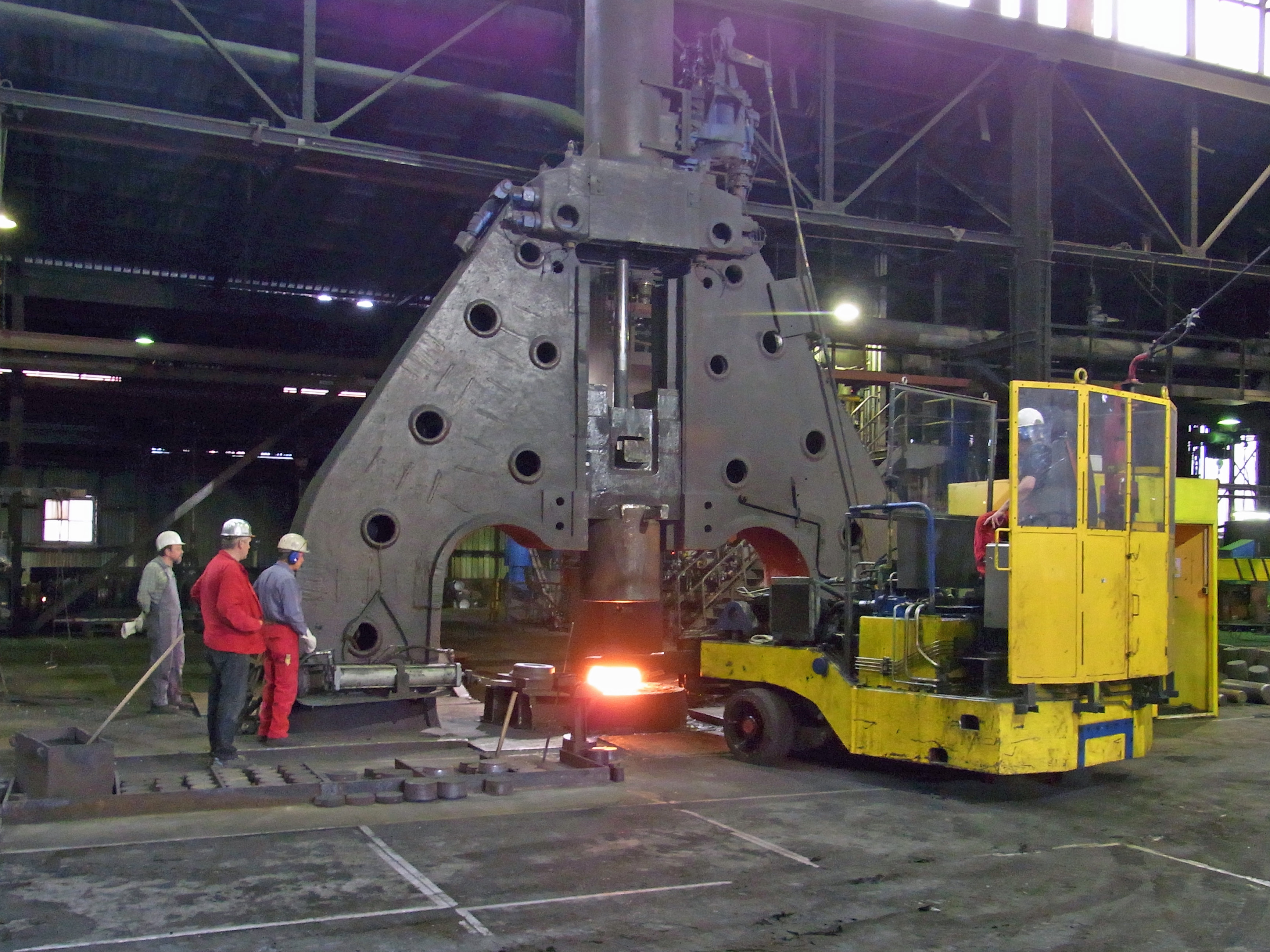 ExtraSchicht 2010 Radreifenproduktion im Bochumer Verein